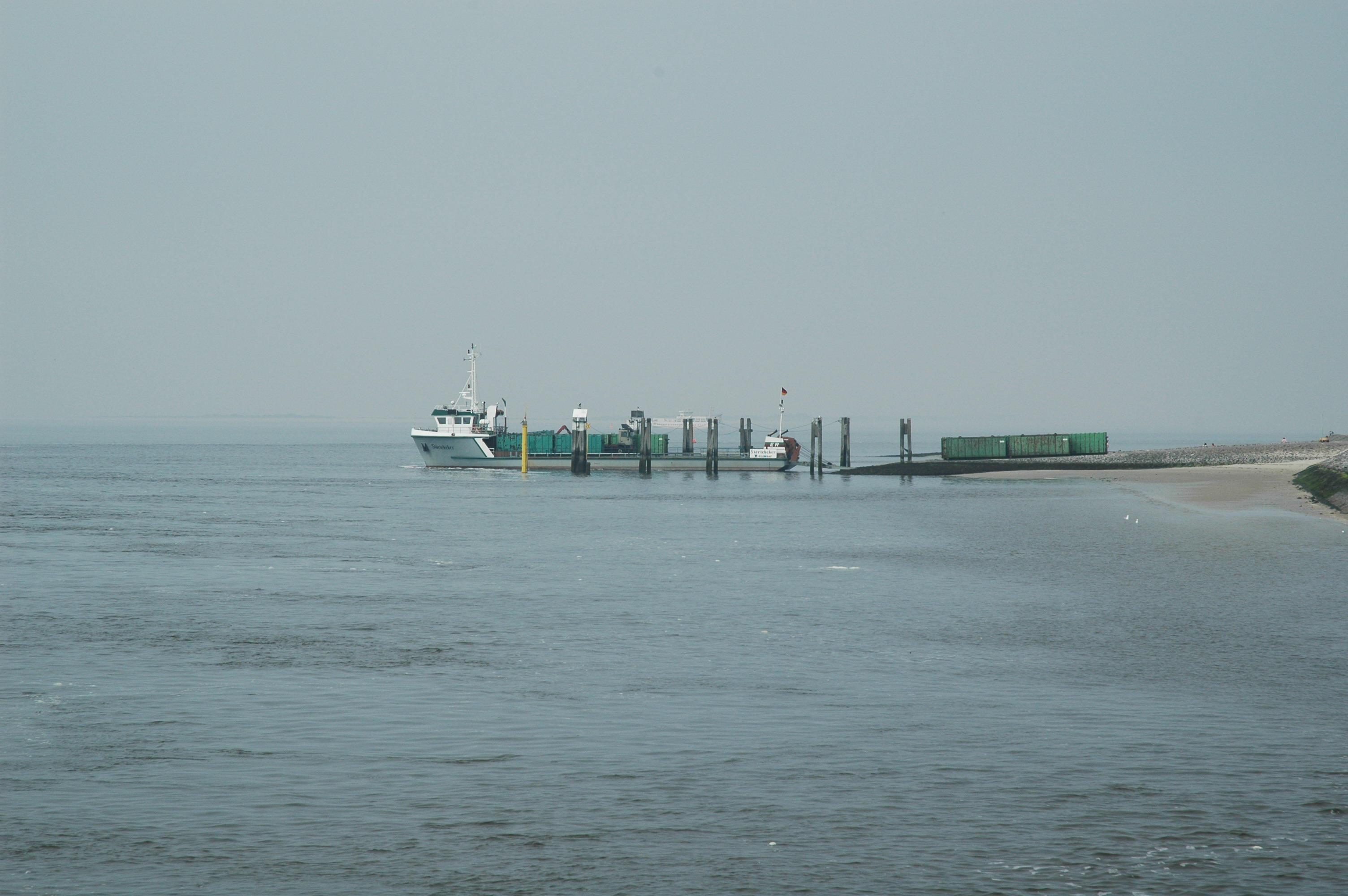 Das Niederkielschiff Störtebeker am Güteranleger von Norderney.